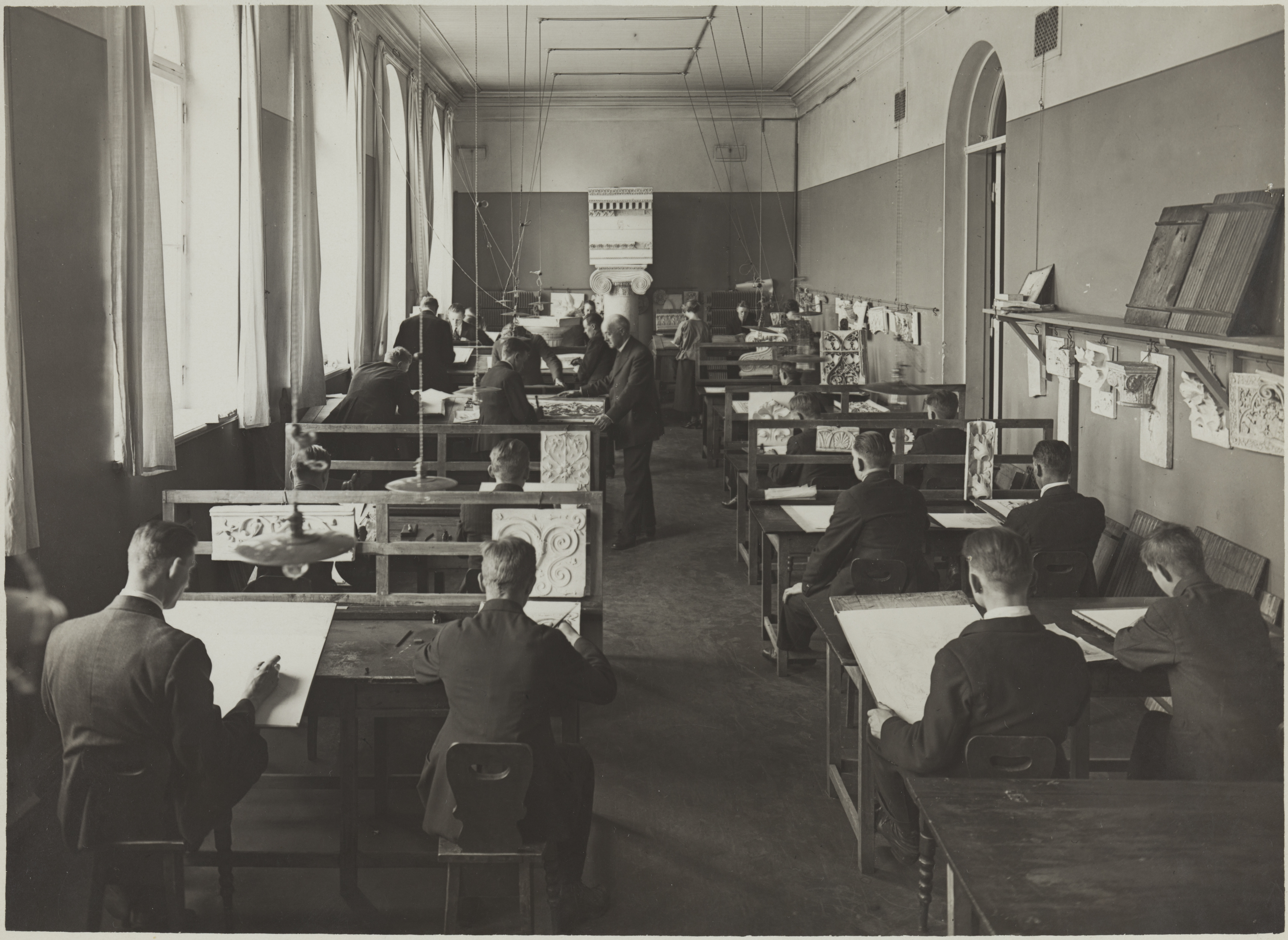 Käsivarapiirustuksen opetustilanne, opettaja Rafael Blomstedt, 1920-luku. Taideteollisuuskeskuskoulun opetustilanteita. Aalto-yliopisto / Aalto University Tiedätkö lisää tästä kuvasta? Jätä kommentti tai ota yhteyttä sähköpostitse: Lisätietoja kuvakokoelmista / more information